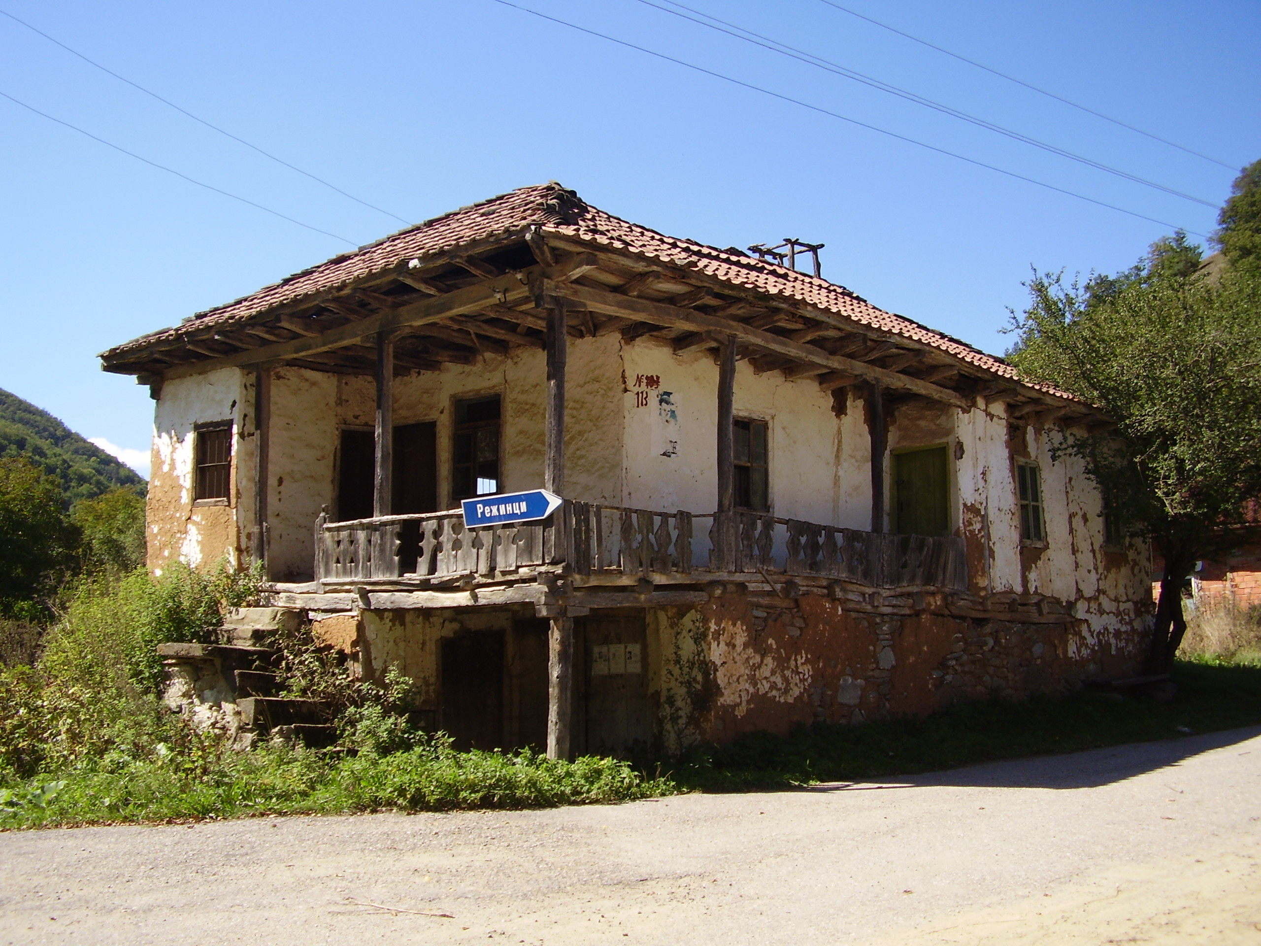 село Ломница, Кюстендилска област